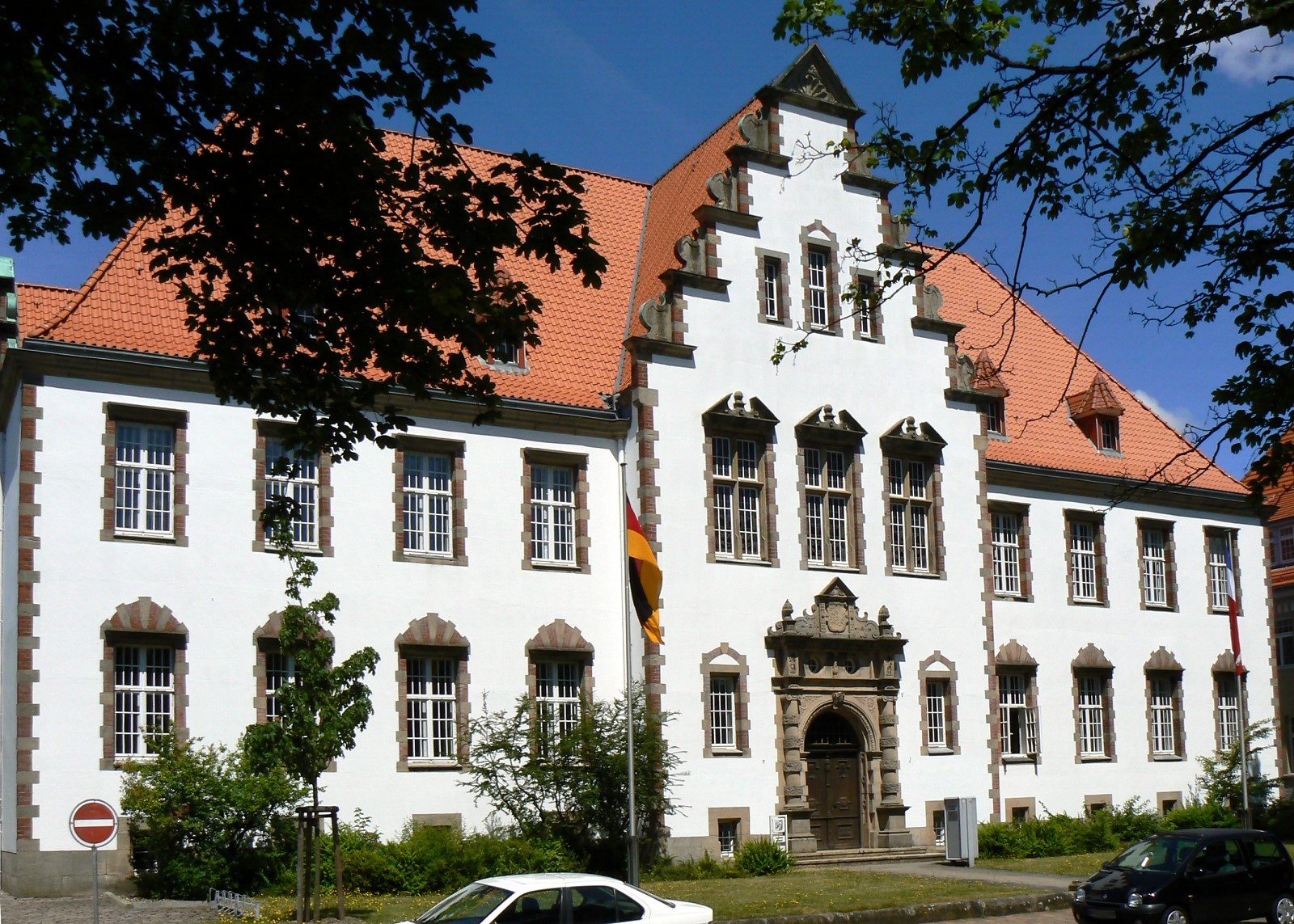 Das Amtsgericht Husum in der Theodor-Storm-Straße in Husum.